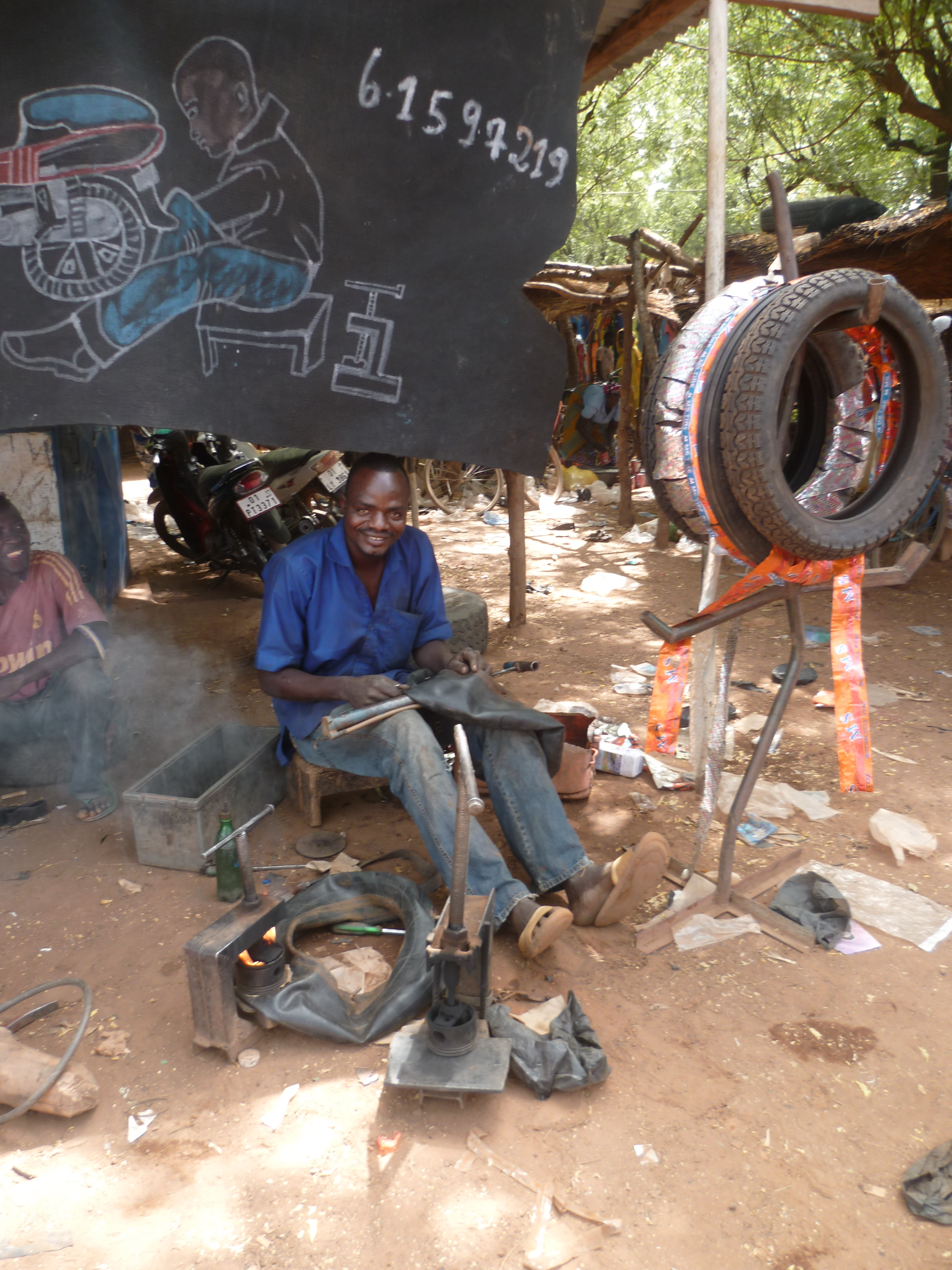 Burkina Faso - Guibaré - Collage de chambres à Air (COLAGE en Burkinabé, ou réparation de chambres à air en Français...) This is an image with the theme "Africa on the Move or Transport" from: Burkina Faso